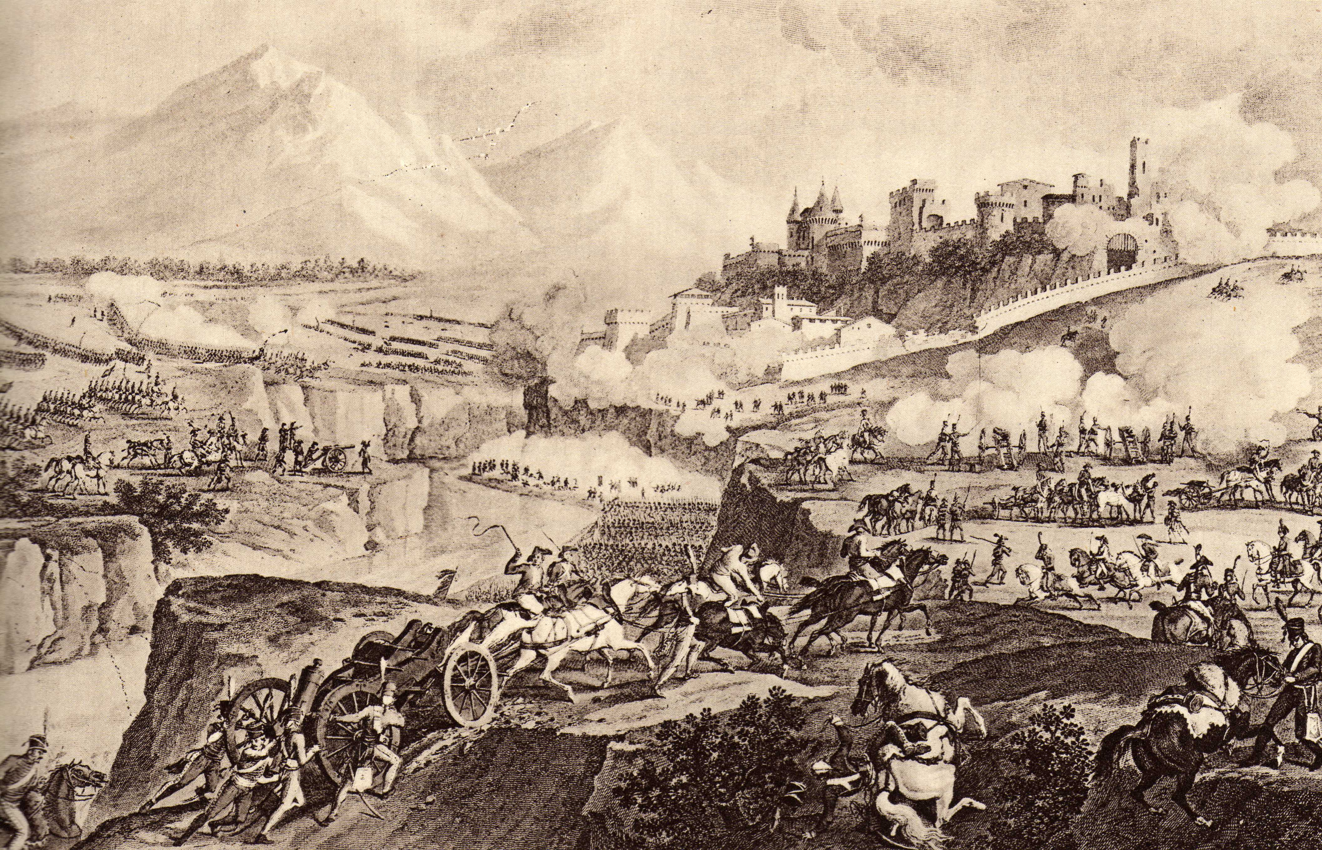 Bataille de Rovereto livrée le 4 septembre 1796 entre les armées française et autrichienne. Gravure de l'époque.